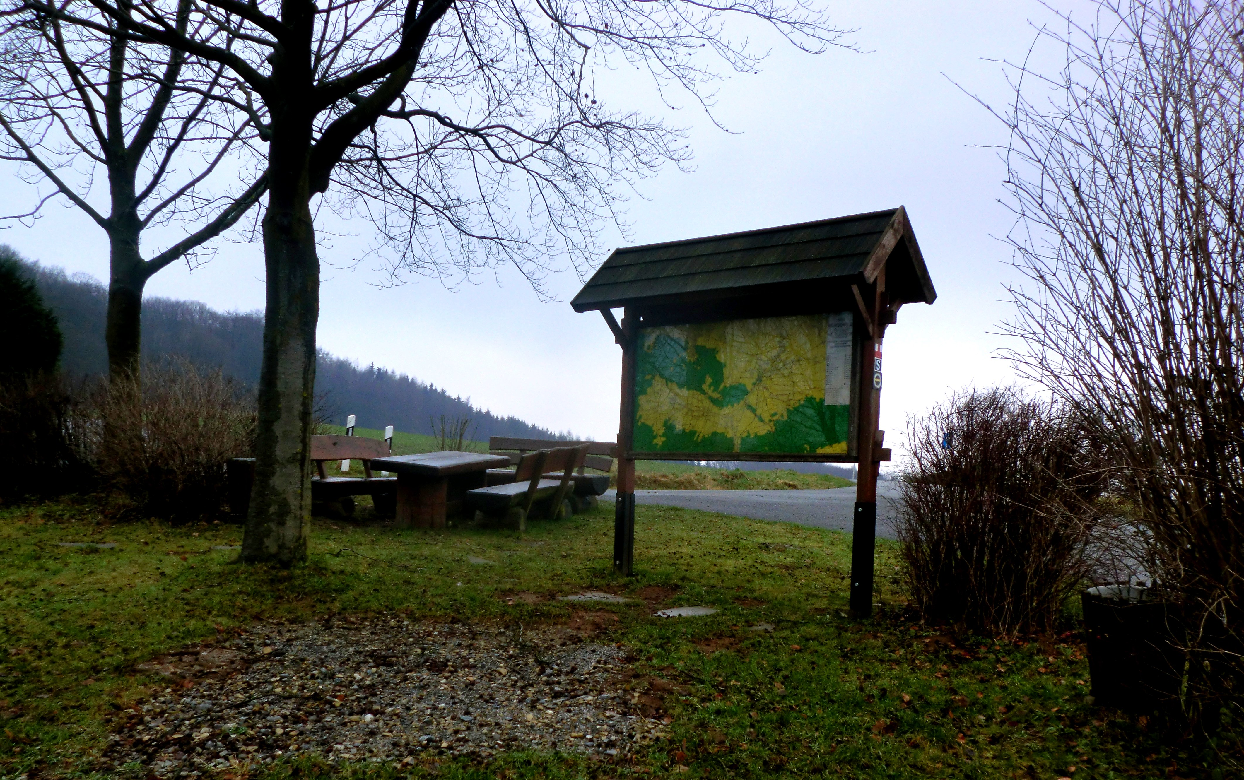 Sitzgruppe auf Verkehrsinsel unweit des Feuerlöschteichs Balkenkamp